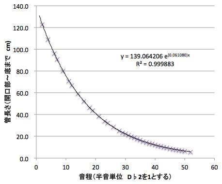 サンポーニャの管長（実測値）と音程 グラフ